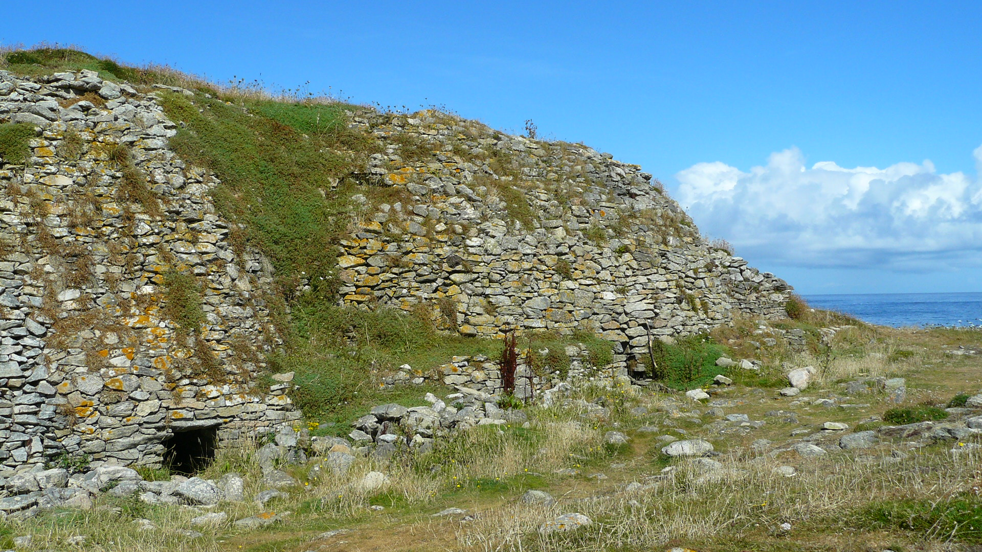 Façade du cairn primaire de l'île Carn, sur la commune de Ploudalmézeau, dans le Bas-Léon, en Finistère, en Bretagne. Vue prise du sud. De gauche à droite : l'entrée du dolmen central, celle du dolmen nord, et le massif avec contrefort qui prolonge le cairn primaire au nord-est.